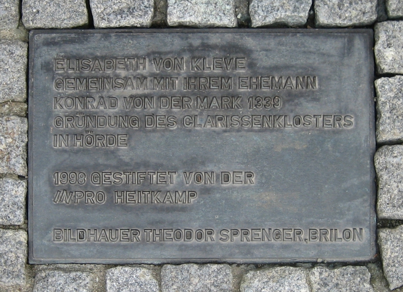 Tafel am Denkmal von "Elisabeth von Kleve" gegenüber dem Marktplatz in Dortmund-Hörde